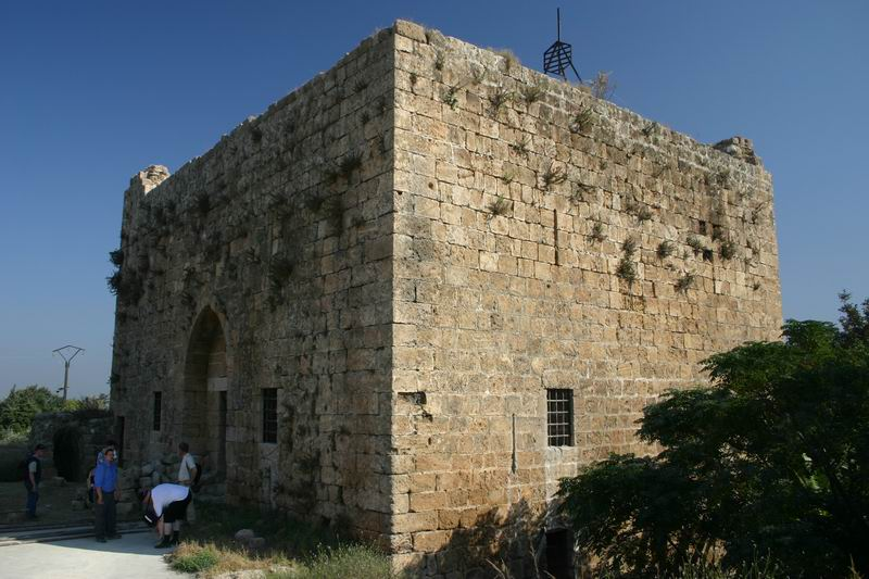 Yahmour